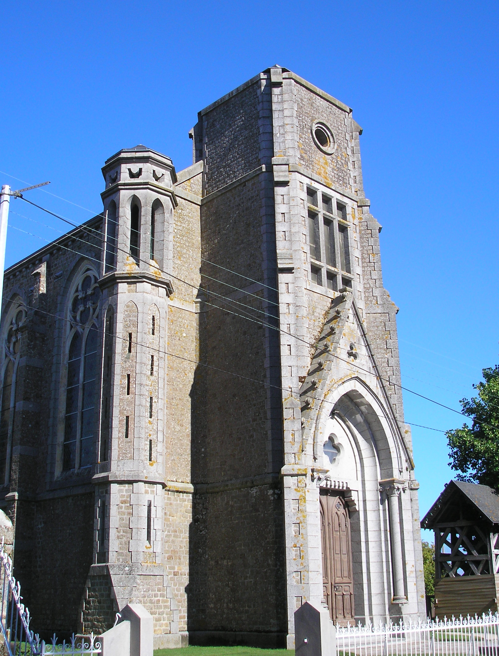 La Selle-la-Forge (Normandie, France). L'église Saint-Sauveur.